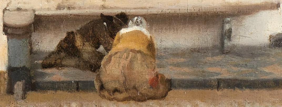 Vermeer La Ruelle detail enfants